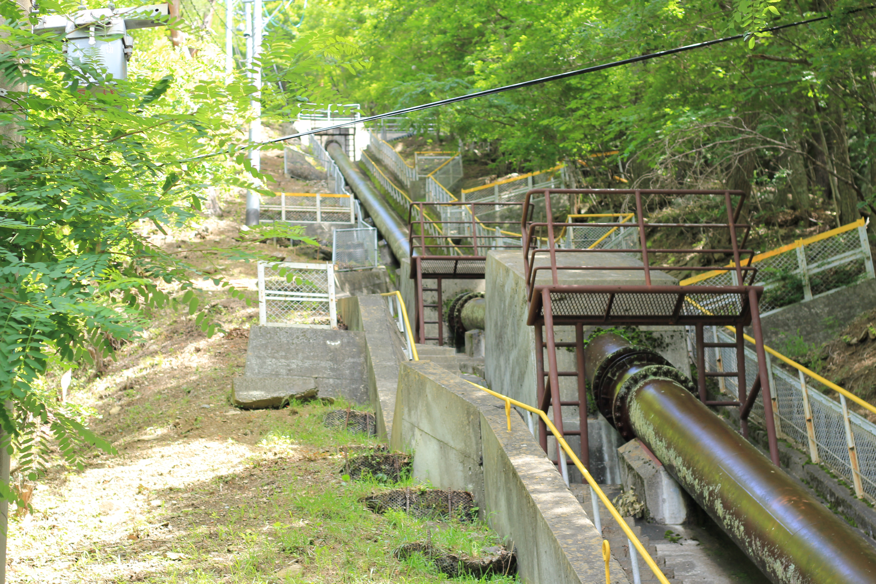 伊那市（長谷地区）戸台発電所